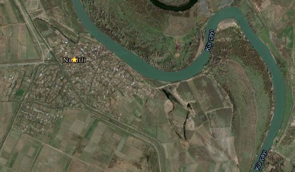 Nəzirli kəndi